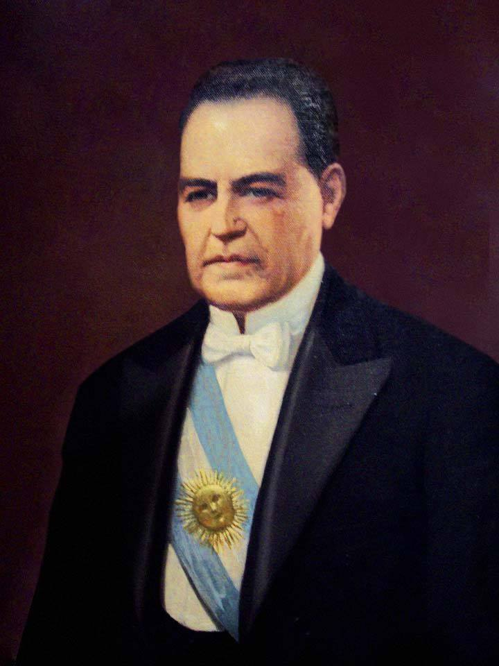 Retrato Yrigoyen Museo Bicentenario.